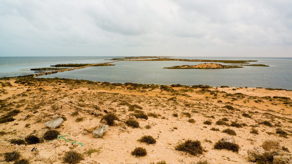 20100928-P1100477